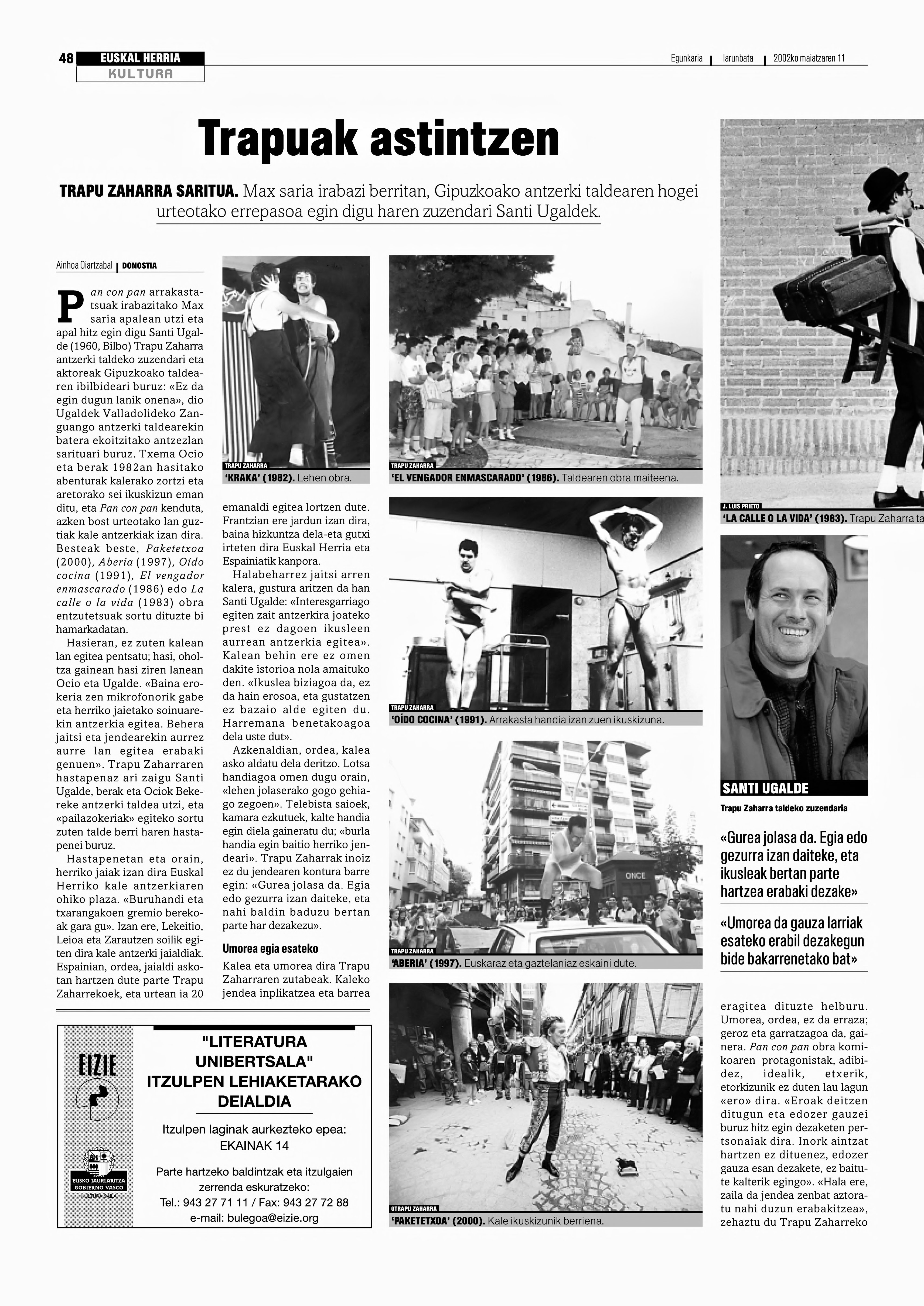 Trapu Zaharra kale antzerkia (Euskaldunon Egunkaria, 2002)